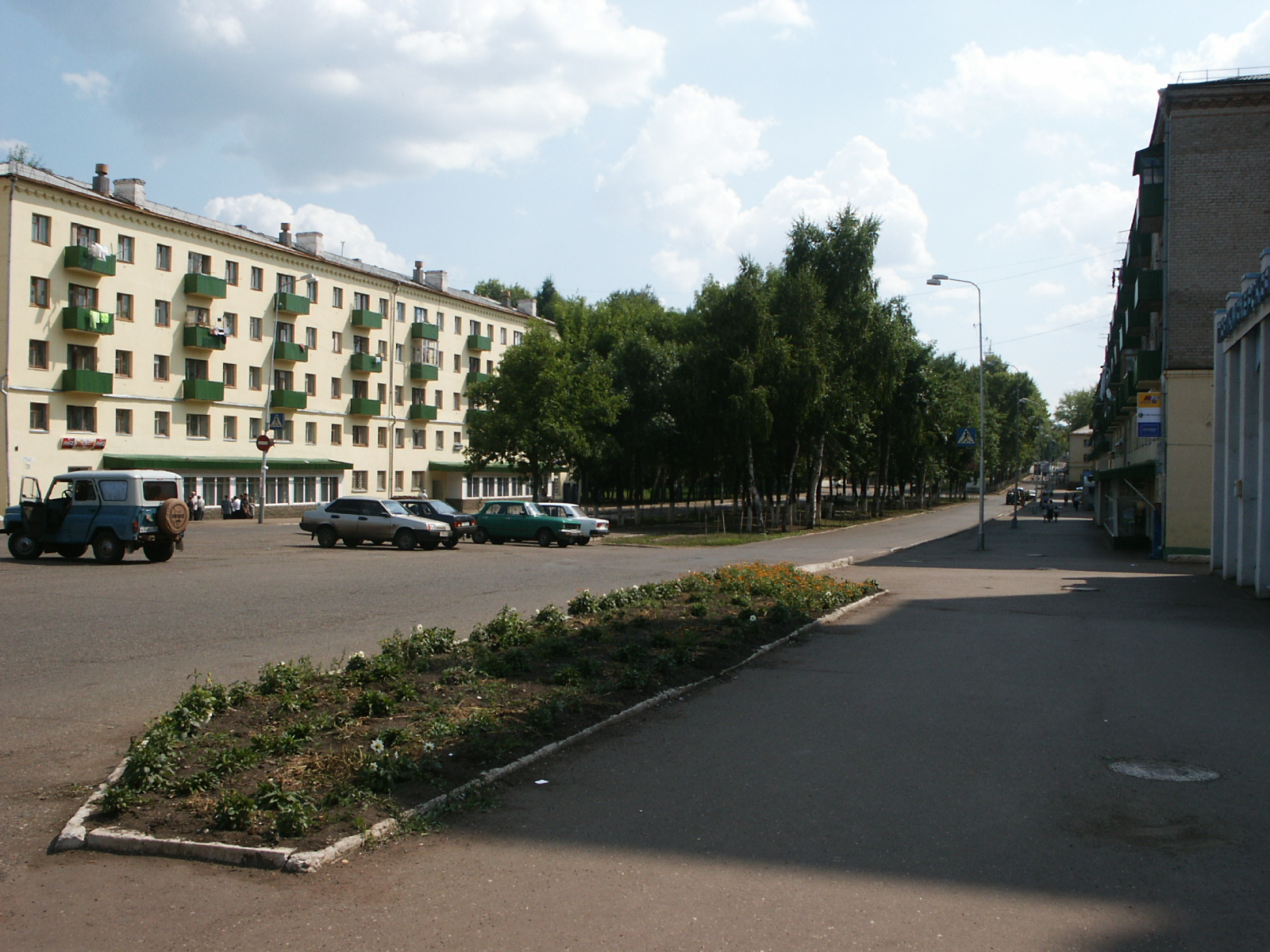 Площадь у Вечного Огня